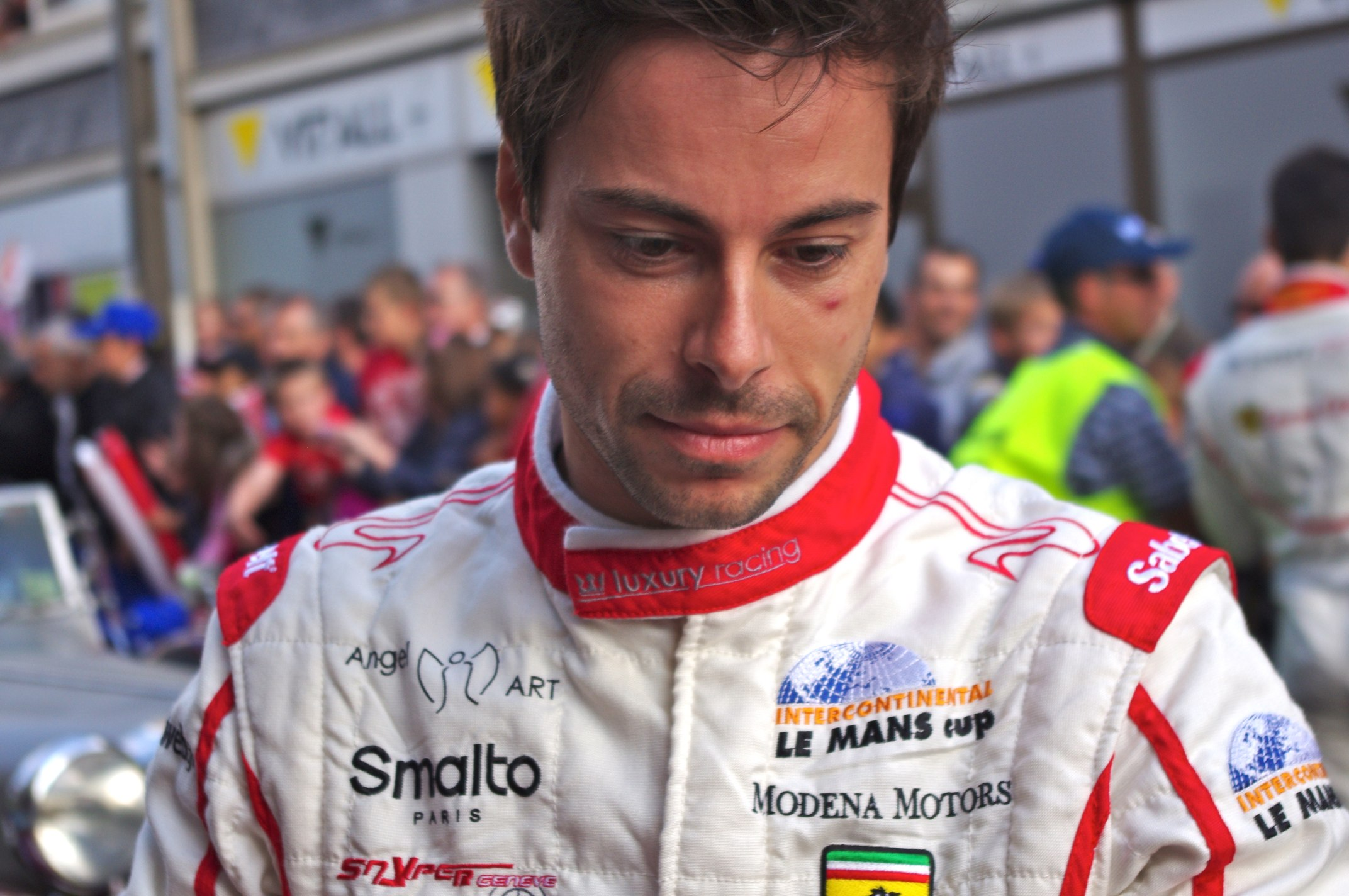 Frédéric Makowiecki at the Le Mans 24 Hours 2011 Drivers' Parade